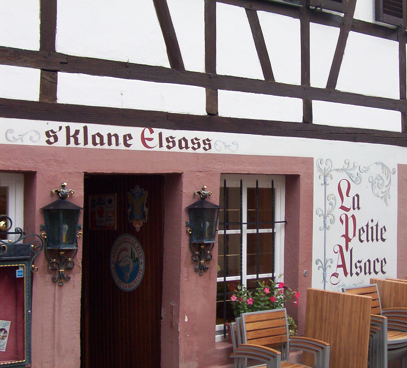 bilingual name